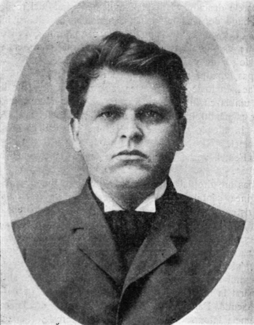 Mihail Sadoveanu (n. 5 noiembrie 1880, Pașcani, România[3] – d. 19 octombrie 1961, Vânători-Neamț, România[4]) a fost un scriitor, povestitor, nuvelist, romancier, academician și om politic român. Este unul dintre cei mai importanți și prolifici prozatori români din prima jumătate a secolului al XX-lea, având o carieră ce se întinde pe parcursul a cincizeci de ani. Este cunoscut mai ales pentru romanele sale istorice și de aventuri, deși autorul a creat pagini nemuritoare despre lumea țărănească din Moldova, despre natura României și a scris, de asemenea, reportaje și pagini memorialistice. Sadoveanu a fost unul din primii colaboratori ai revistei tradiționaliste Sămănătorul, înainte de a deveni un scriitor realist și adept al curentului poporanist reprezentat de revista literară Viața Românească.